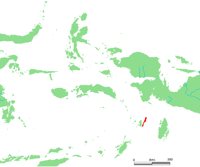 ID Kai Besar.PNG